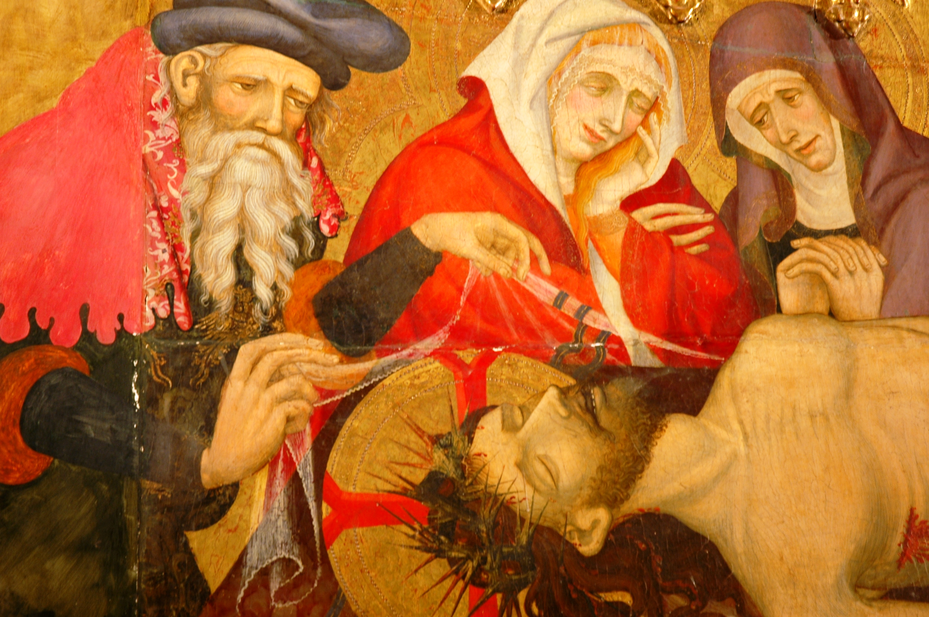 Detall de la predel.la (autor: Lluís Borrassà) del retaule del Sant Esperit de la Seu de Manresa (autor: Pere Serra)